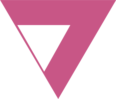 フラチナリズムのフリーで使用していい写真募集。